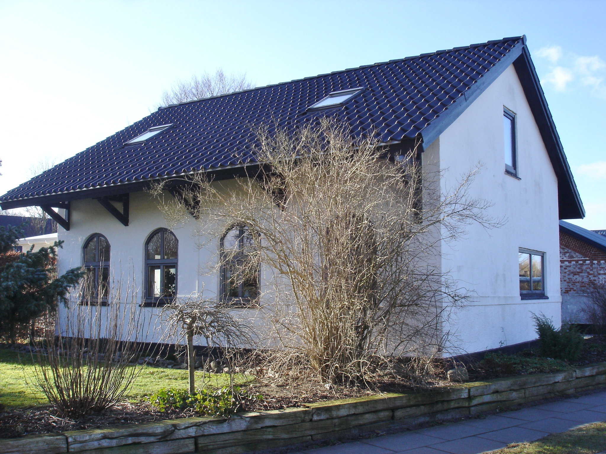 Elling Station fra Ø